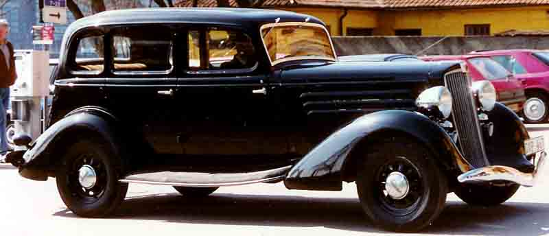 Hupmobile Series 417-W 4-Door Sedan 1934